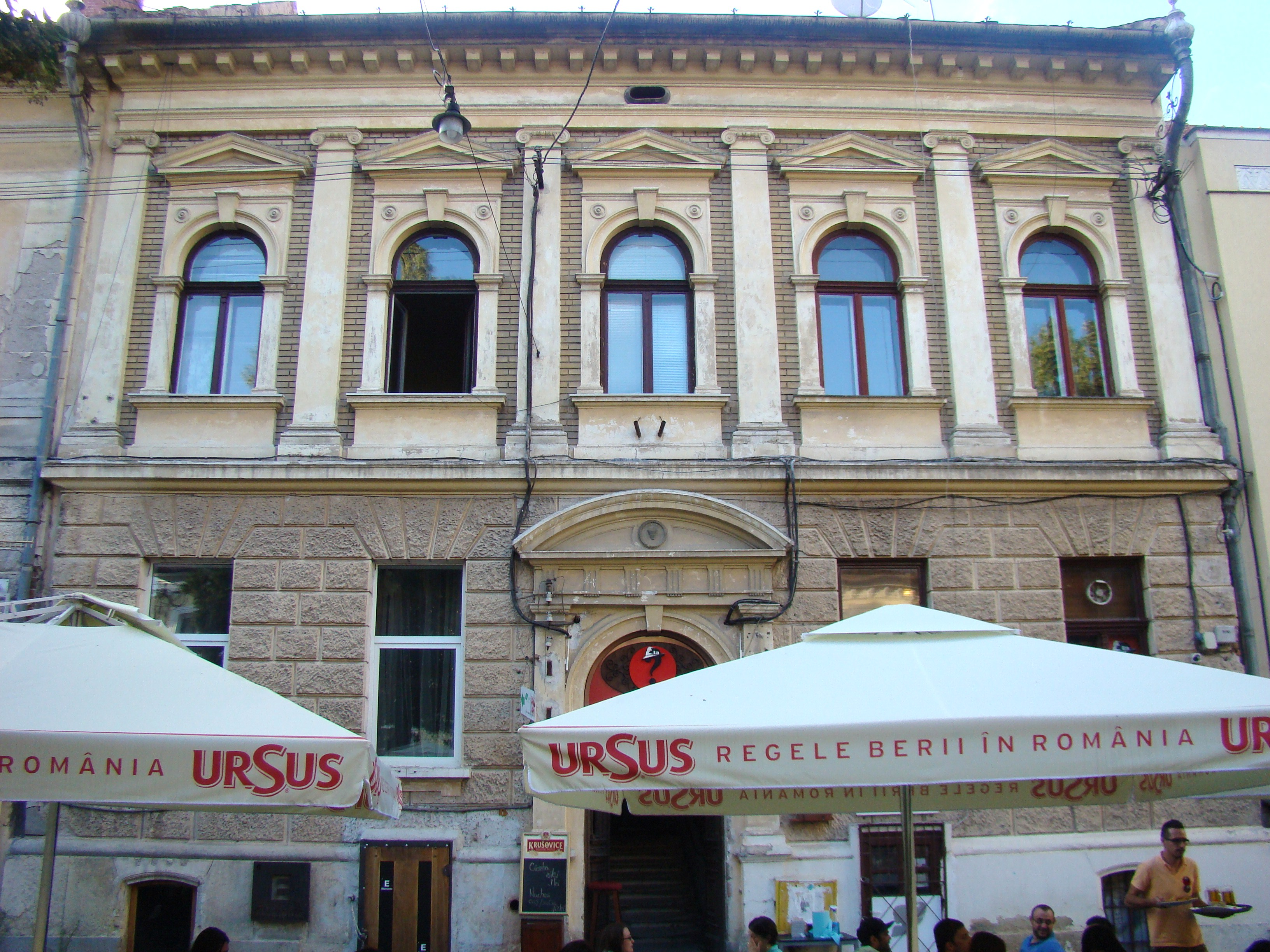 Clădire monument istoric, Piața Muzeului nr.5